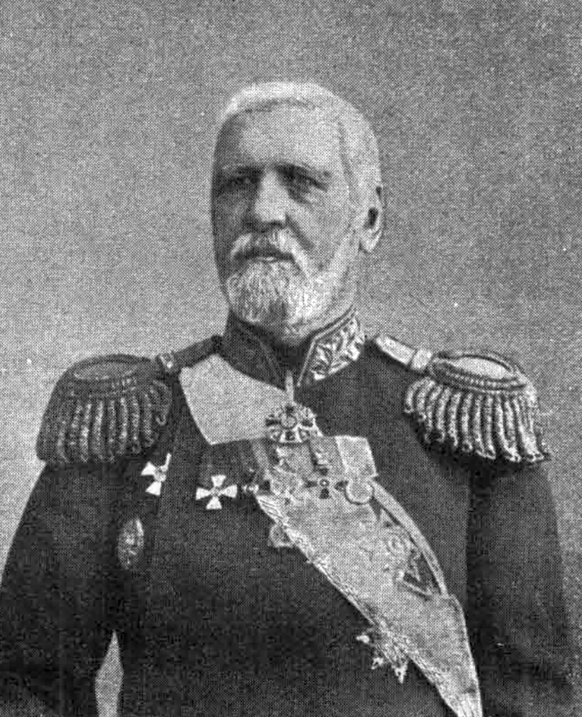 Резвой, Орест Павлович